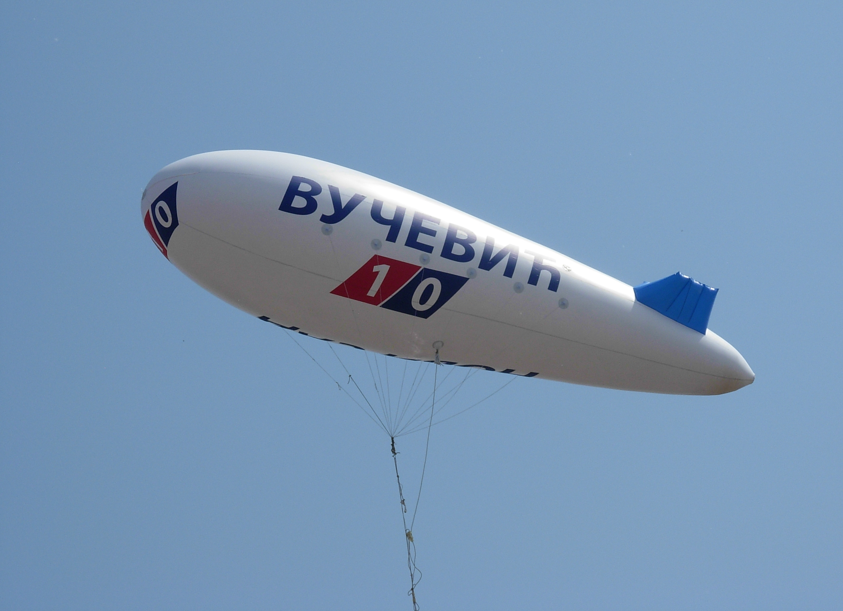 Balon - Srpska napredna stranka, u Novom Sadu.